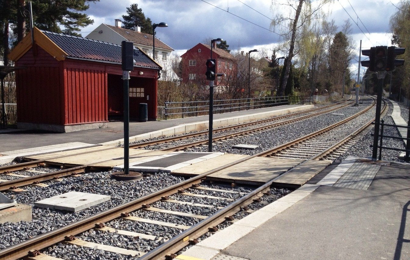 Sørli stasjon, Ekebergbanen, Oslo